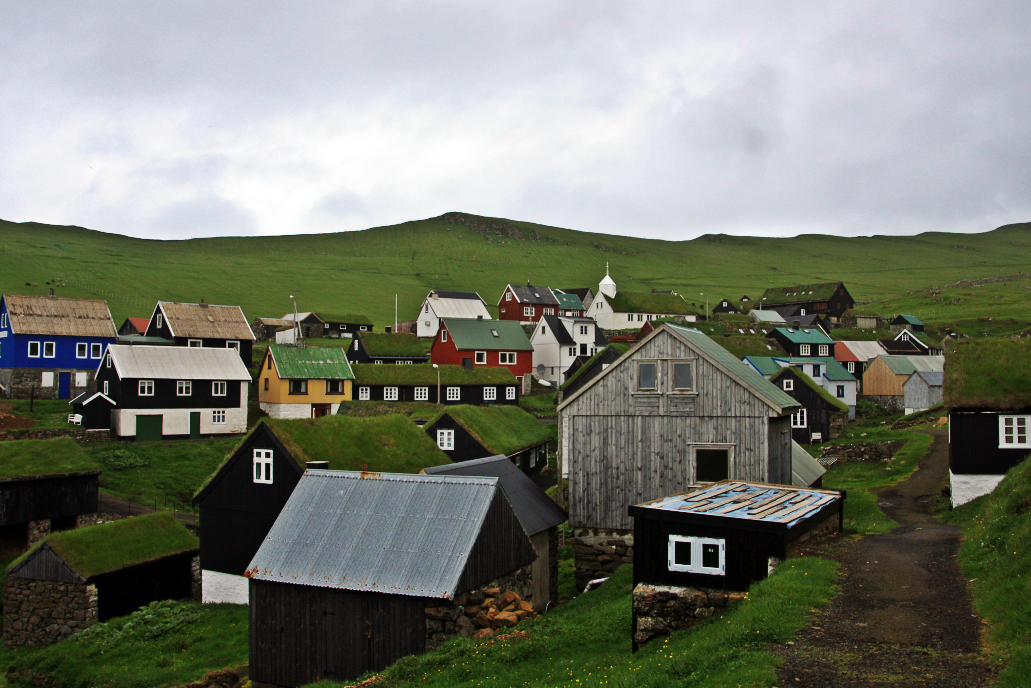 Mykines village, Faroe Islands